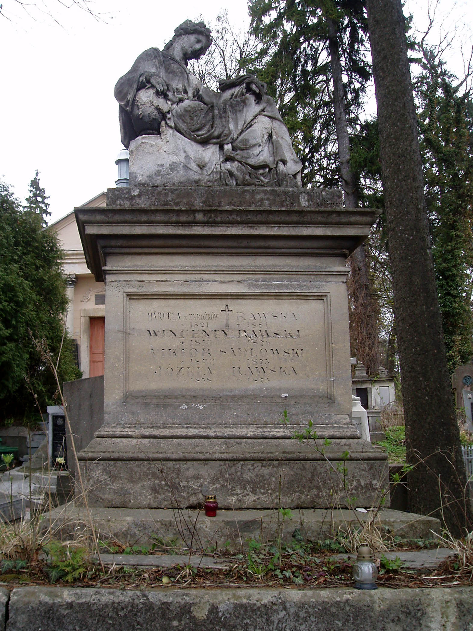 Гробівець родини Равських на Личаківському цвинтарі у Львові.